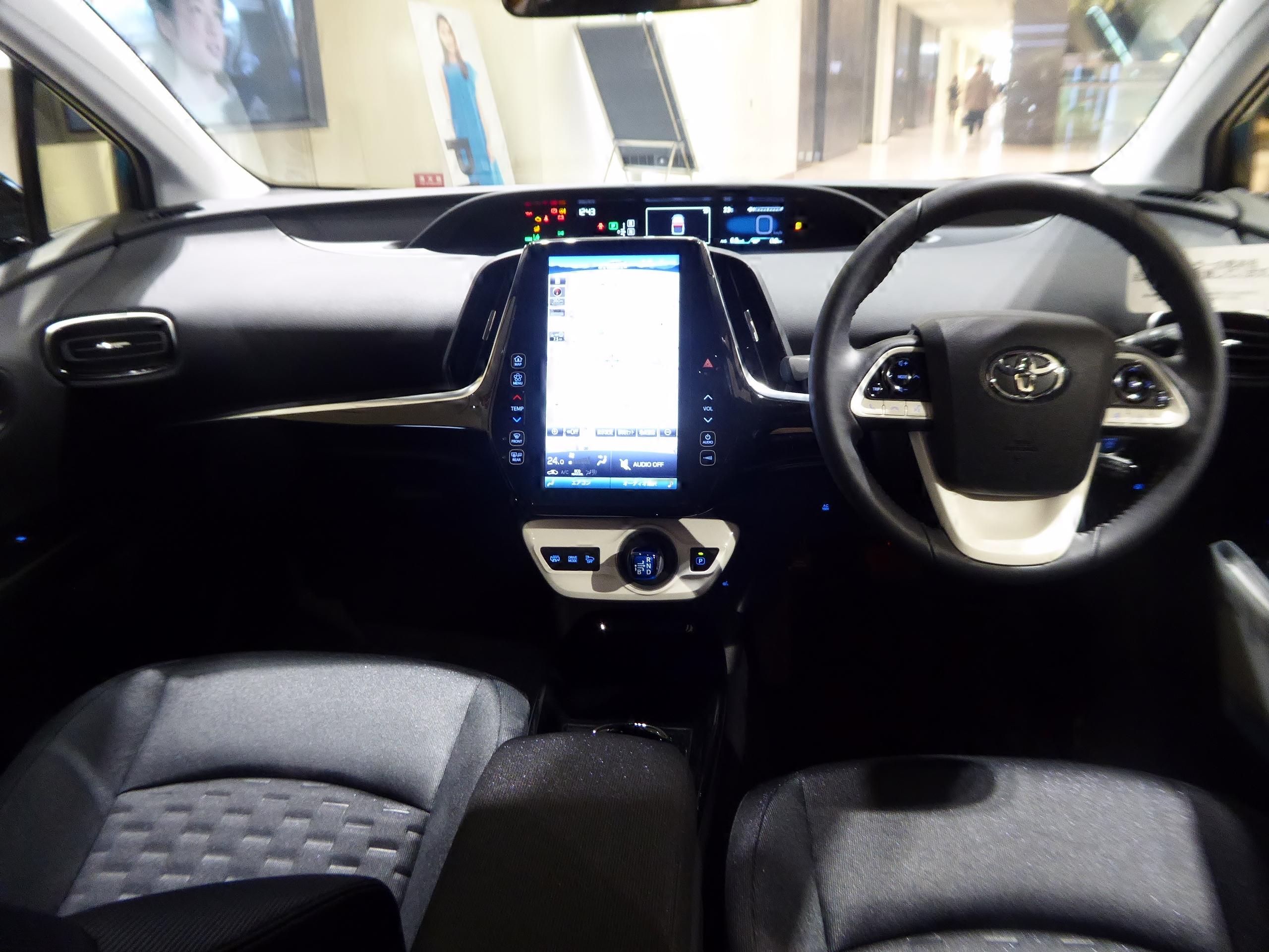 DLA-ZVW52-AHXGB型トヨタ・プリウスPHV Aのインテリアを撮影。